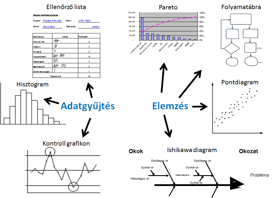 7 minőségügyi eszköz szerepe az adatgyűjtésben és az elemzésben problémamegoldás során